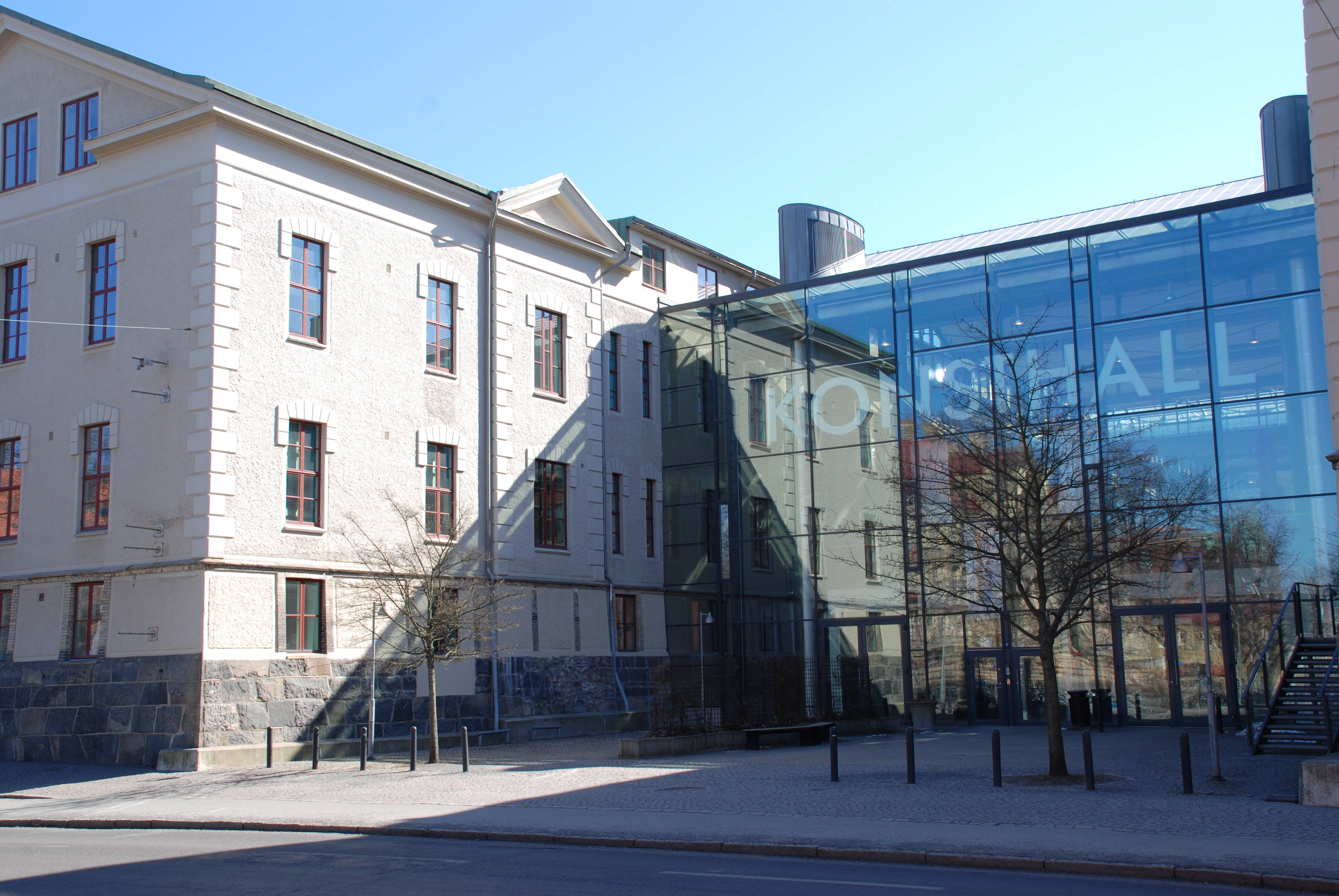 Vasa konsthall, f.d. Vasa sjukhus, Läraregatan 3 i Göteborg.